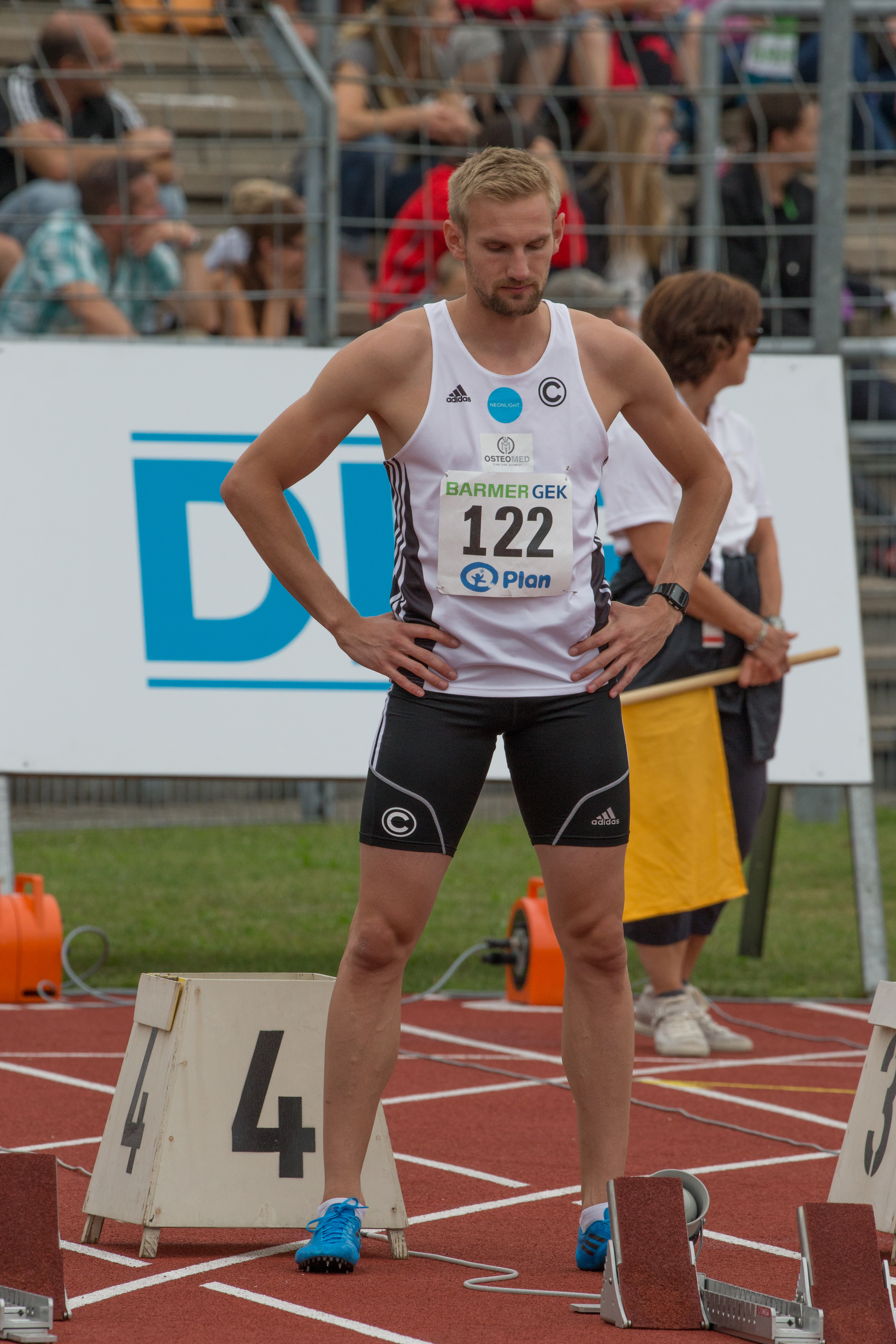 114. Deutsche Leichtatheltik Meisterschaften 2014 in Ulm - 100m Männer - Alle Ergebnisse/Teilnehmer unter